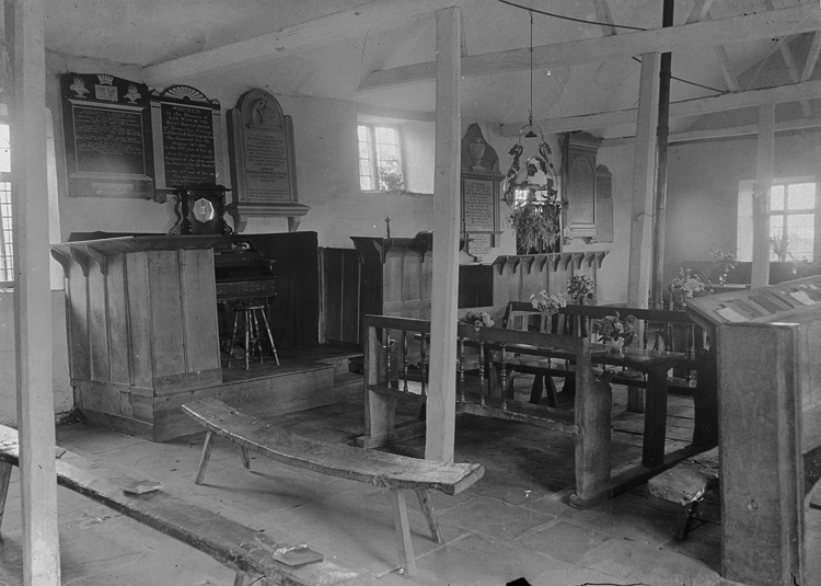 Ffotograffydd/Photographer: P B Abery (1877?-1948) Dyddiad/Date: [191-?] Cyfrwng/Medium: Negydd gwydr / Glass negative Maint/Dimensions: 119 x 163 mm. Cyfeiriad/Reference: PBA17/27 Rhif cofnod / Record no.: 4458100 Rhagor o wybodaeth am gasgliad P B Abery yn Llyfrgell Genedlaethol Cymru More information about the P B Abery Collection at the National Library of Wales